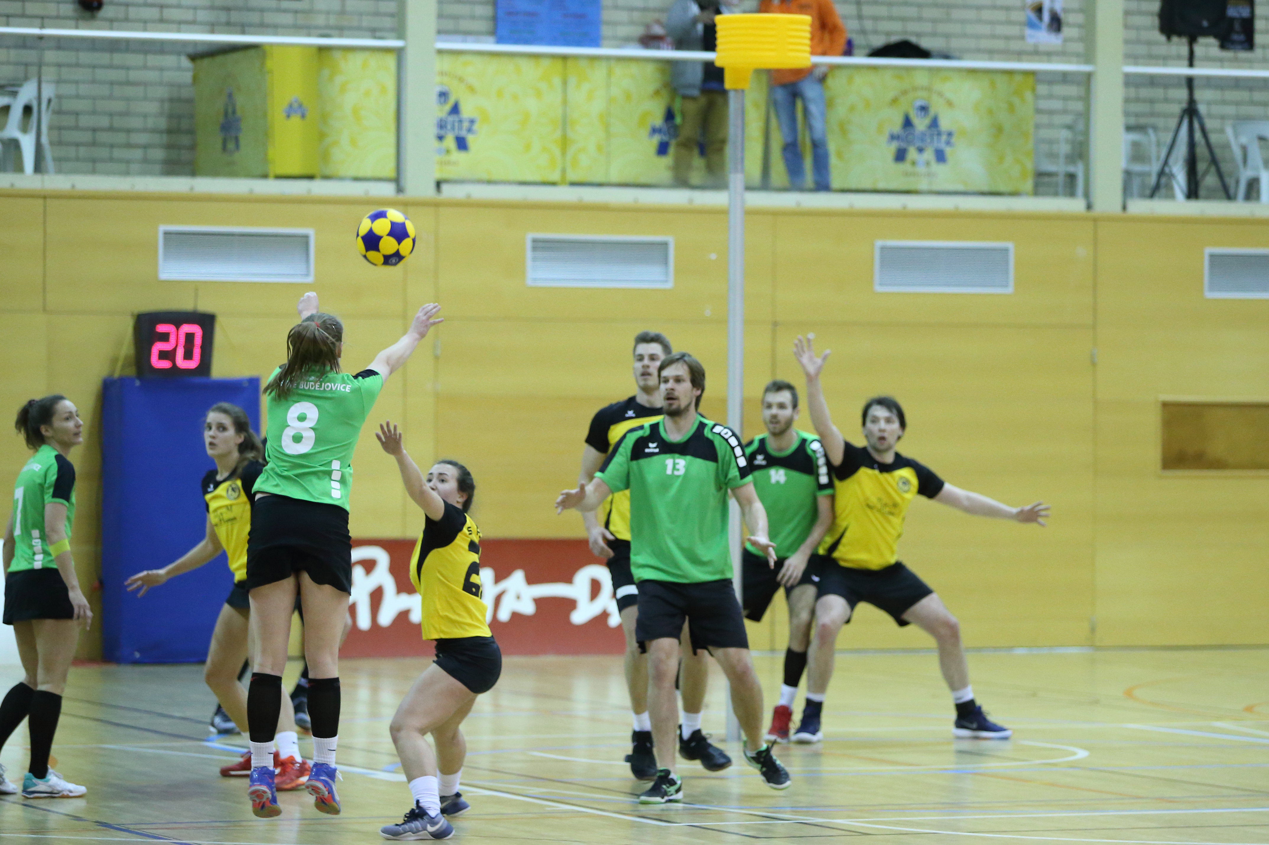 Korfbal